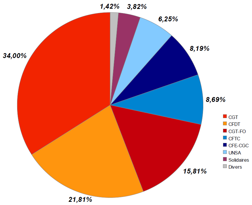 Camembert représentant la répartition des votes dans le collège des salariés à l'issue des élections Prud'hommes de 2008.